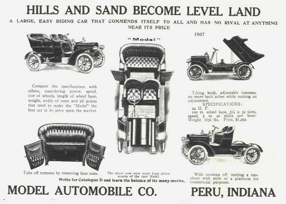 1907 Model Automobile Co. ad. This company was a newly installed subsidiary of the Model Gas Engine Works, taking over their Motor vehicle manufacture. Shown is the 24 HP Style No. 10, a large (275 c.i. /4.5 litre) two cylinder car with the engine under the driver's seat, and tiltable body for easy engine repairs. This was it's last year as a model as the make (not the Company) was renamed the Star, and the vehicles were sold as Star Model 12, and 14, the ladder with a longer wheelbase.